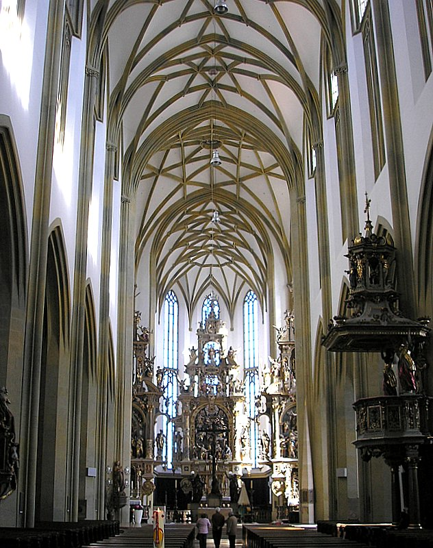 Ehemalige Benediktinerstiftskirche St. Ulrich und Afra (Augsburg, Bayerisch-Schwaben). Innenansicht nach Osten. Eigene Aufnahme, März 2007 / Former Benedictine monastery church St. Ulrich and Afra (Augsburg, Bavaria, Germany). Interior, looking east. Own photo, March 2007